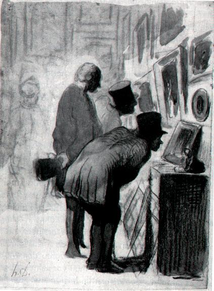 Honoré Daumier (1808-1879): In der Gemäldegalerie (Zeichnung)